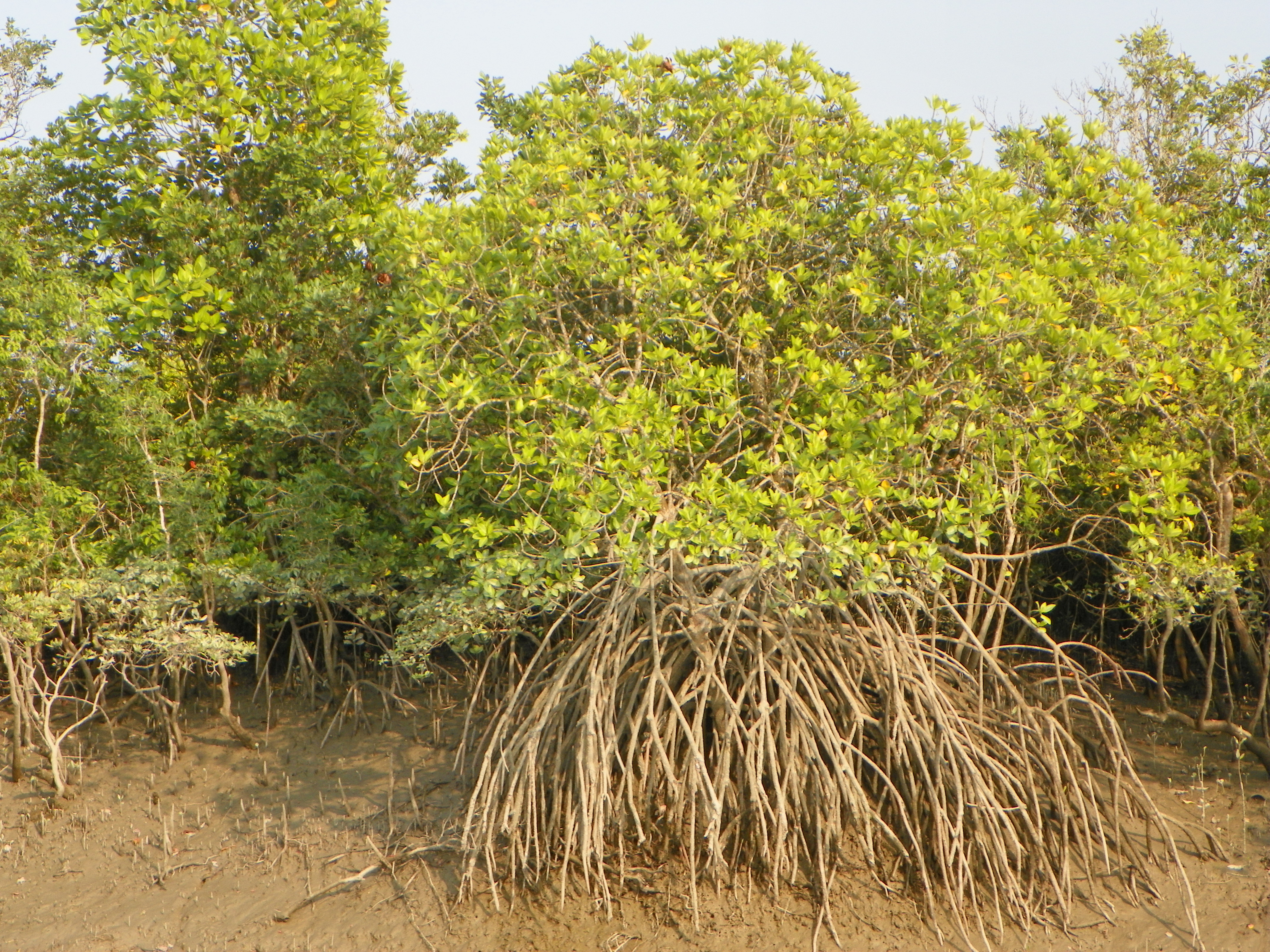 ? Garjan (Rhizophora apiculata) Sndarbans National Park, boat trip sundarbans60_2015-11-26_15-04